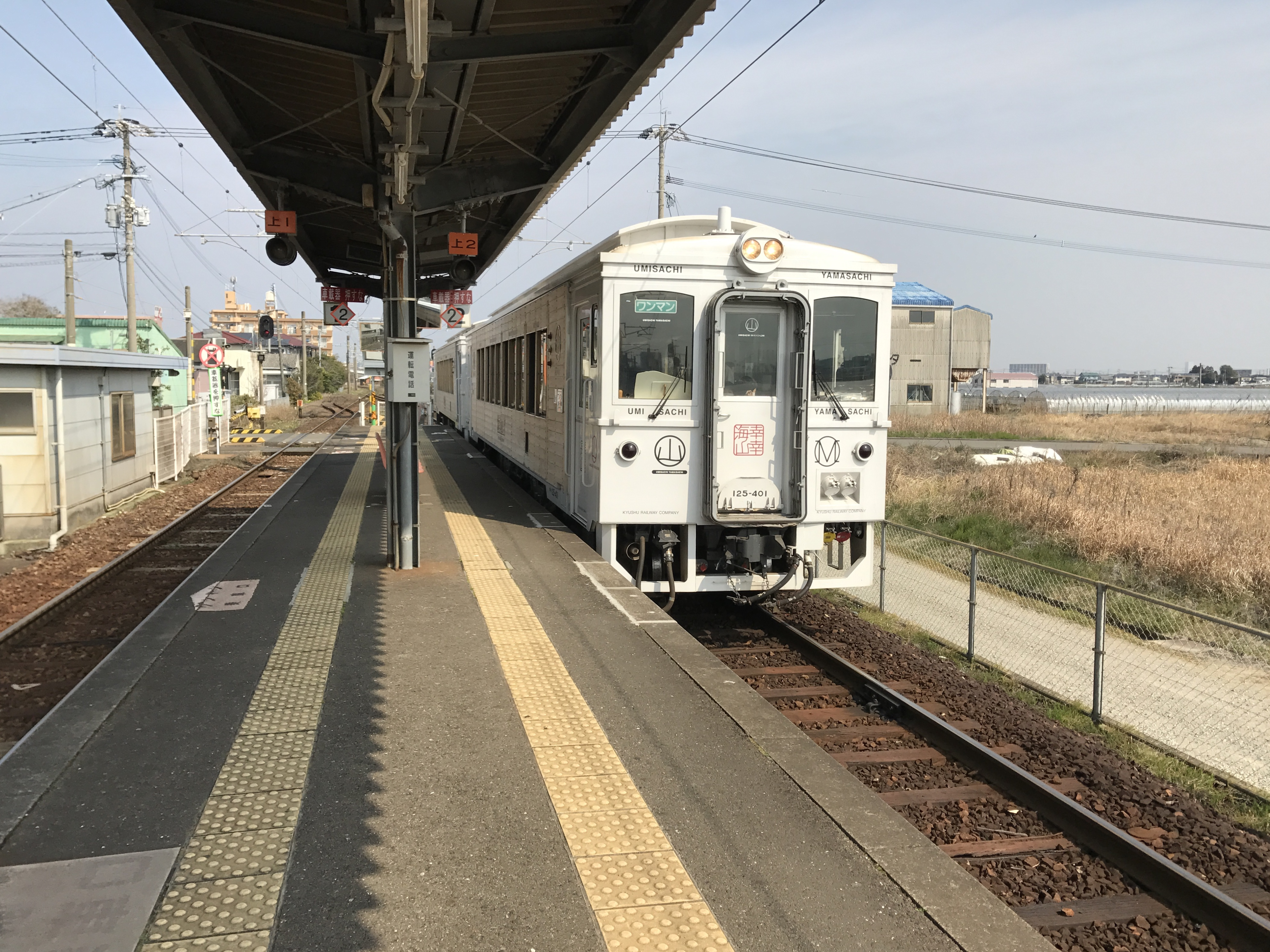 田吉駅に到着する特急「海幸山幸」